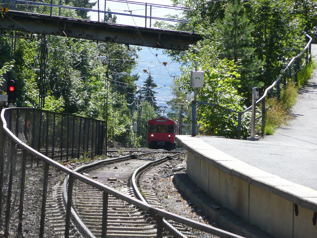 Oslo